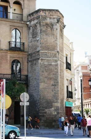 Torre de Abd-el-Aziz, en la esquina de la Avenida de la Constitución con la calle Santo Tomás.